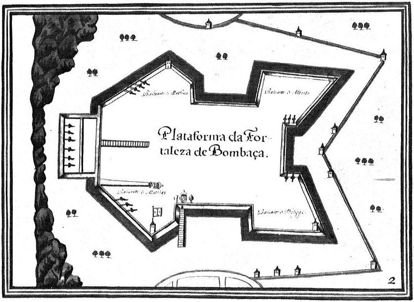 Fort Jesus-Map-XVII